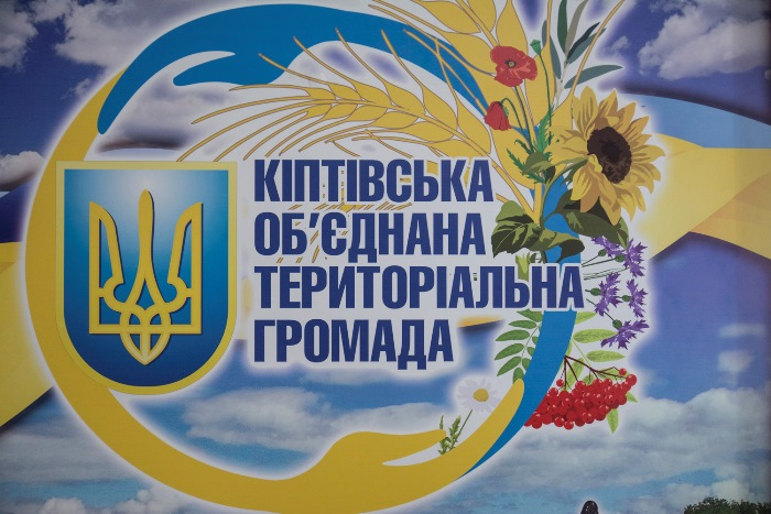 21 червня 2018 Віце-прем’єр-міністр – Міністр регіонального розвитку, будівництва та ЖКГ України Геннадій Зубко разом дипломатичними представниками відвідав Кіптівську ОТГ в Чернігівській області. Геннадій Зубко та Посли G7 у Кіптівській ОТГ обговорили актуальні питання реформи децентралізації.